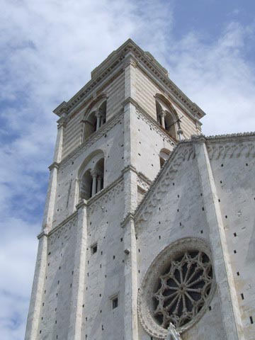 Fermo